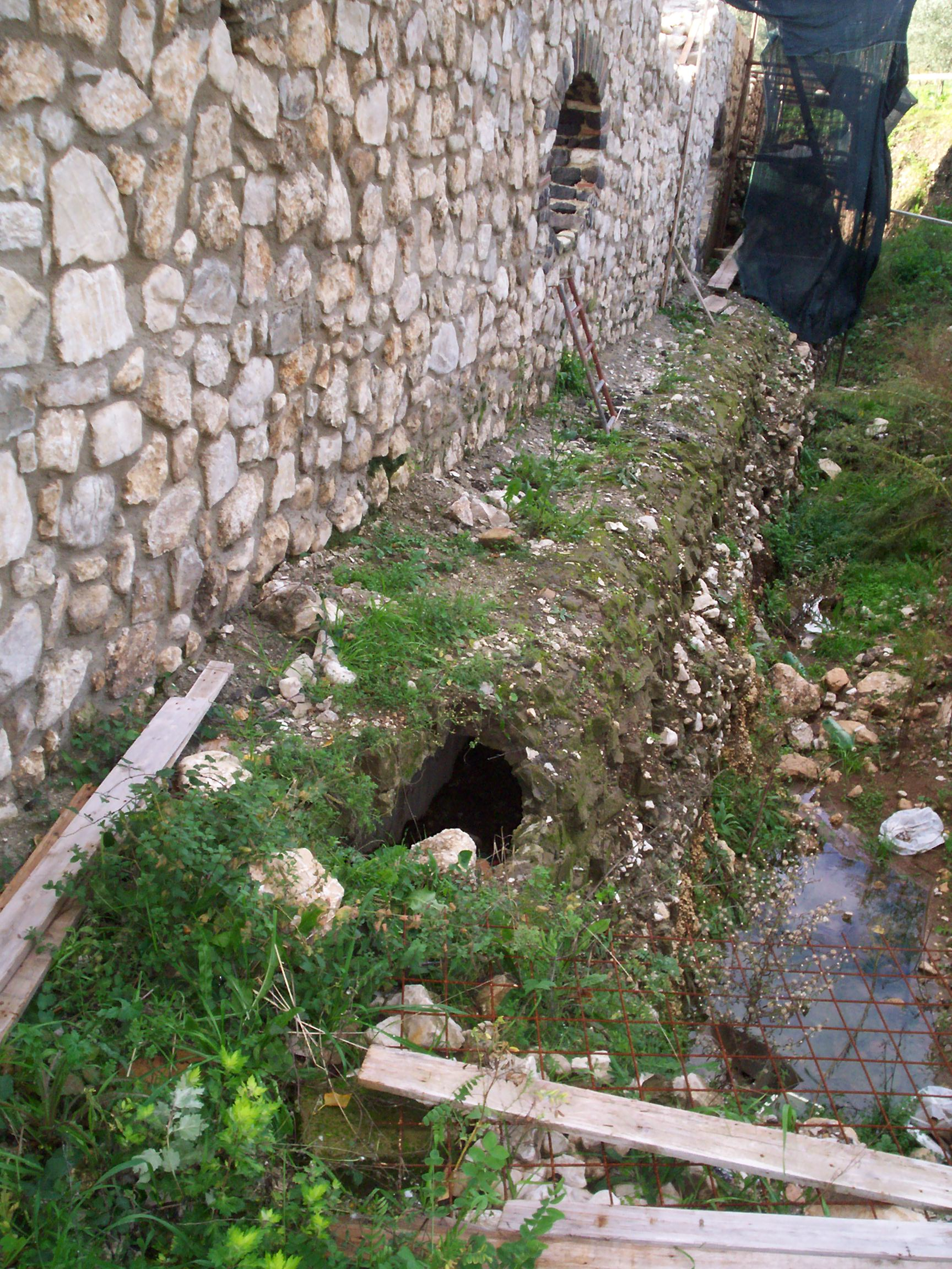 Particolare dei resti dell'ex Tintoria ducale dei panni lana in Cerreto Sannita (Bn)